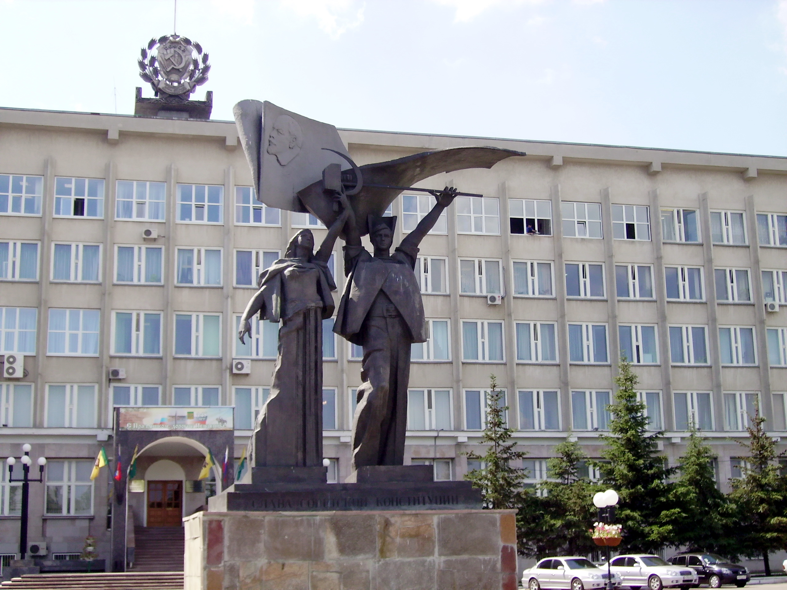 Penza city hall, June 2008.